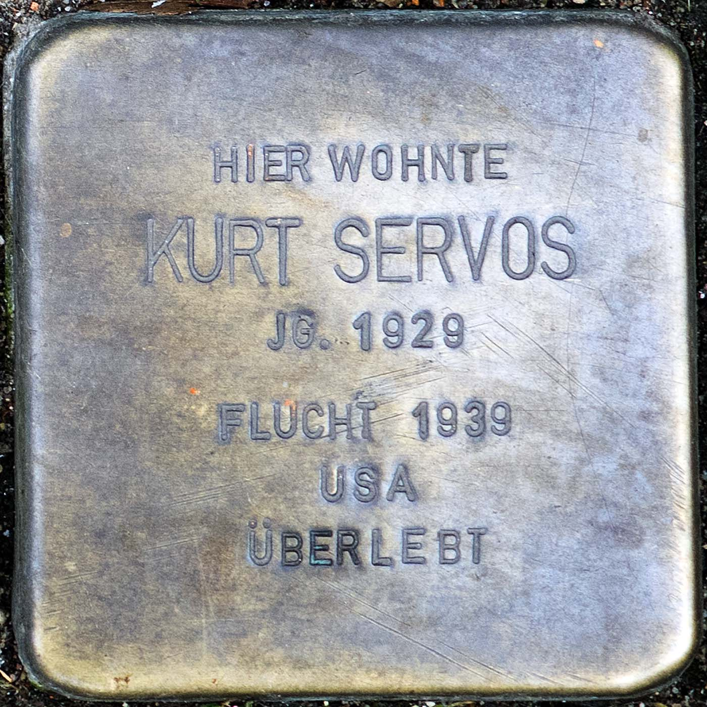 Stolperstein für Kurt Servos (Willich)